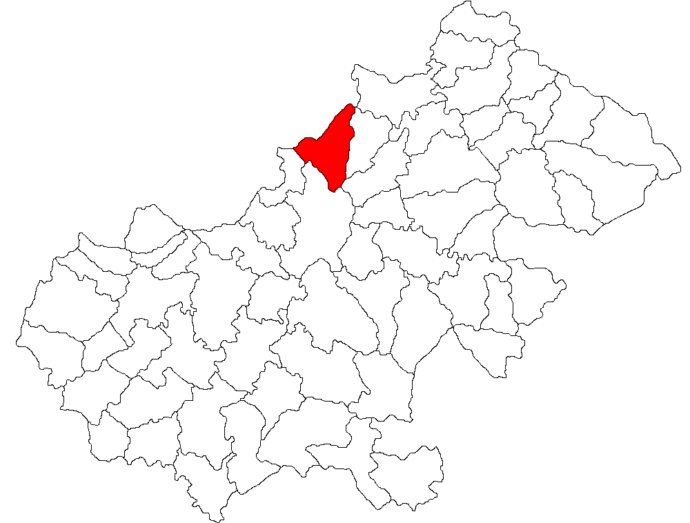 Categorie:Hărţi ale judeţului Satu Mare